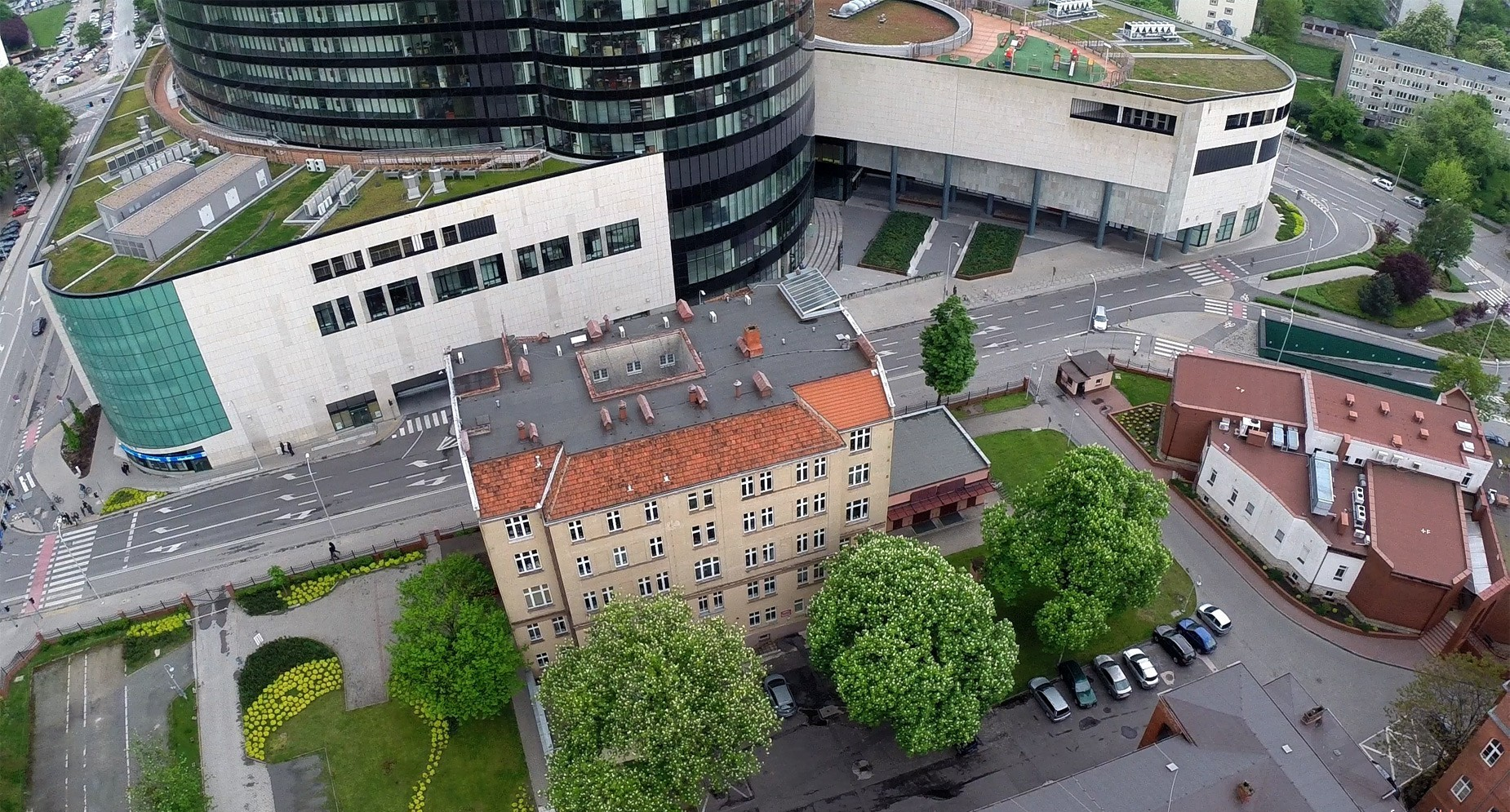 Na pierwszym planie jedyny budynek przy ul. Gwiaździstej ocalały po II wojnie światowej: Gwiaździsta 65-67, dziś bud.H Dolnośląskiego Centrum Onkologii. Po lewej ul. Szczęśliwa, po prawej ul. Wielka i Rondo Havla, pomiędzy nimi końcowy odcinek Gwiaździstej. Za ulicą, naprzeciw bud. H, widoczny fragment kompleksu Sky Tower